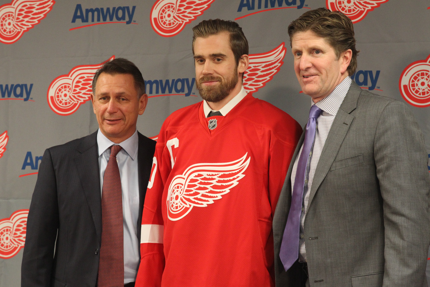 Ken Holland, Henrik Zetterberg and coach Mike Babcock.